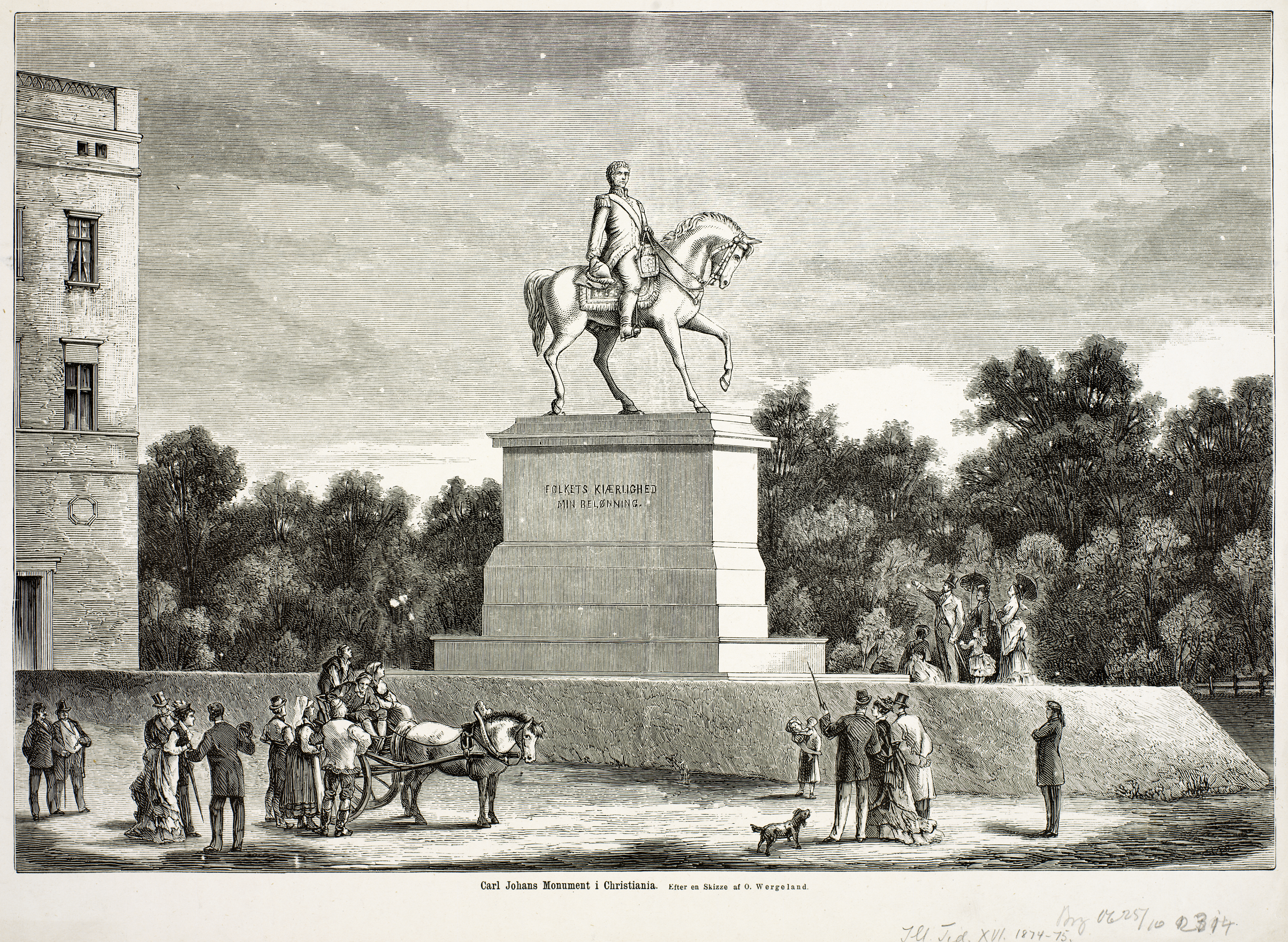 Beskrivelse / Description: Beskrivelse / Description: Karl Johan (1763-1844), i Sverige kjent som Karl 14 Johan. Karl Johan var konge i Sverige og Norge fra 1818 til hans død i 1844 (kilde: snl.no). Tekst på statuen: "Folkets Kiærlighed : Min Belønning" Bildet har stått i "Illustreret Tidende XVI", 1874-75 Dato / Date: 1874/1875 Sted / Place: Oslo, Det kongelige slott Kreditering / Credit: Efter en skizze af O. Wergeland Digital kopi av original / Digital copy of original: stikk / engraving Eier / Owner Institution: Nasjonalbiblioteket / National Library of Norway Lenke / Link: Bildesignatur / Image Number: blds_01095